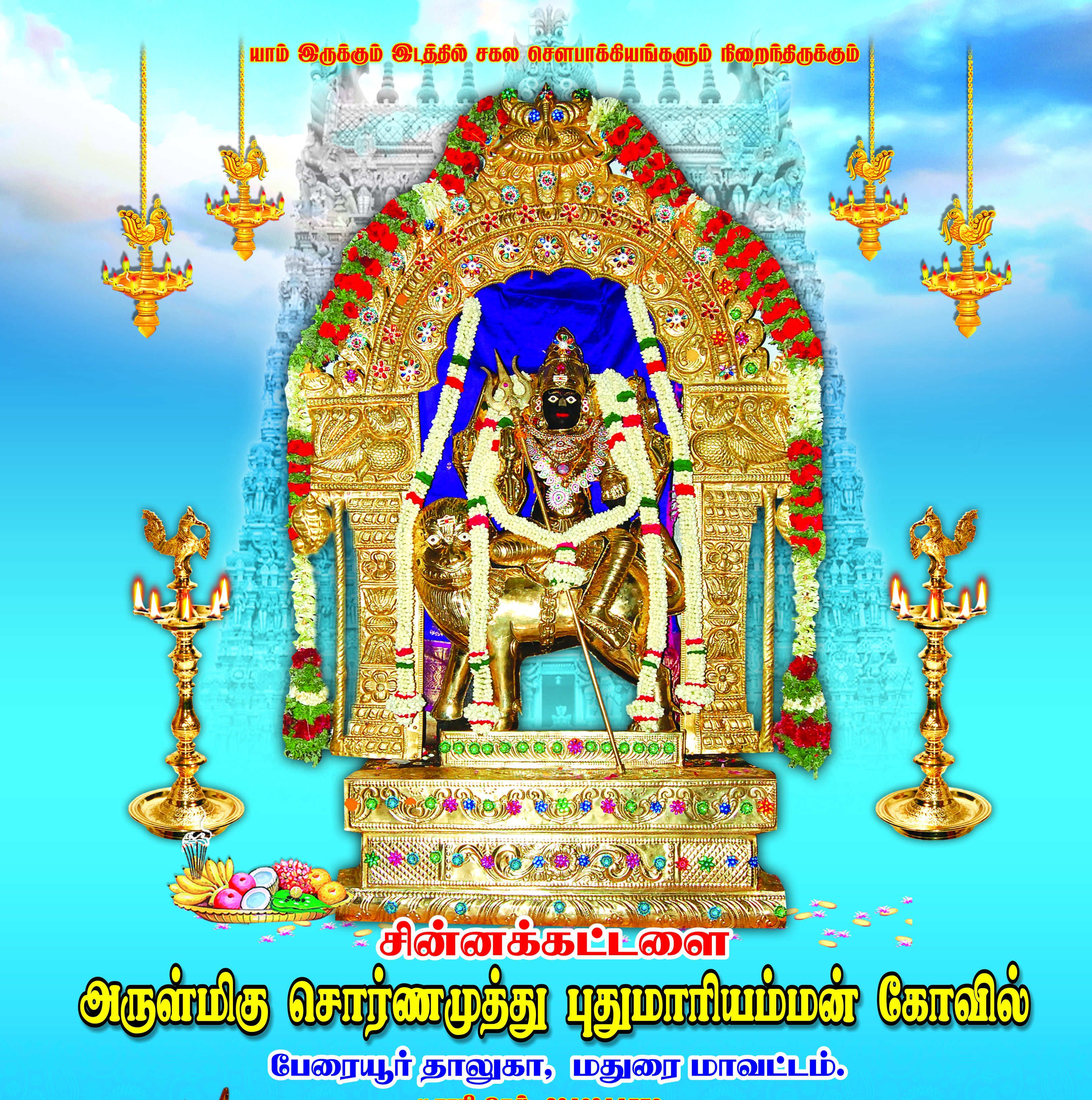 1947 ல் இருந்து